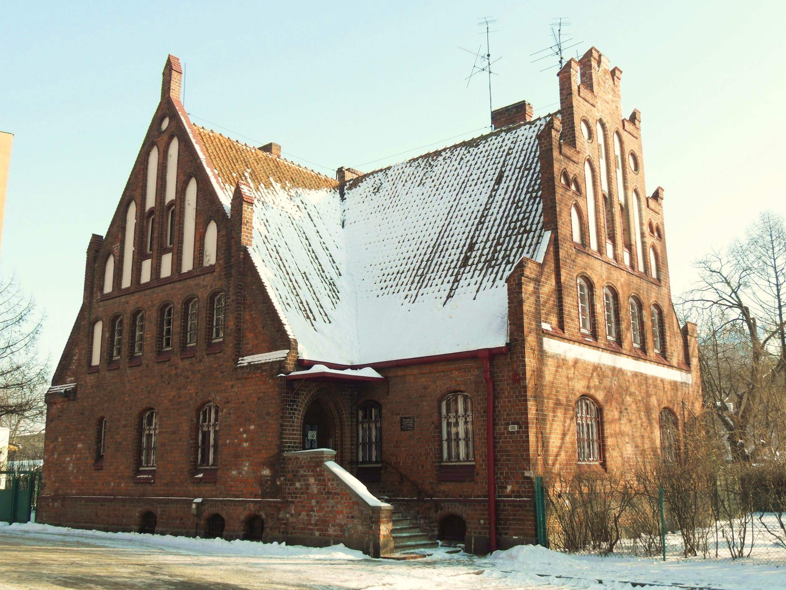 Gdańsk Siedlce (Emaus), ul. Kartuska 186 - plebania, 1904-1906 rzymskokatolickiego kościoła parafialnego p.w. św. Franciszka